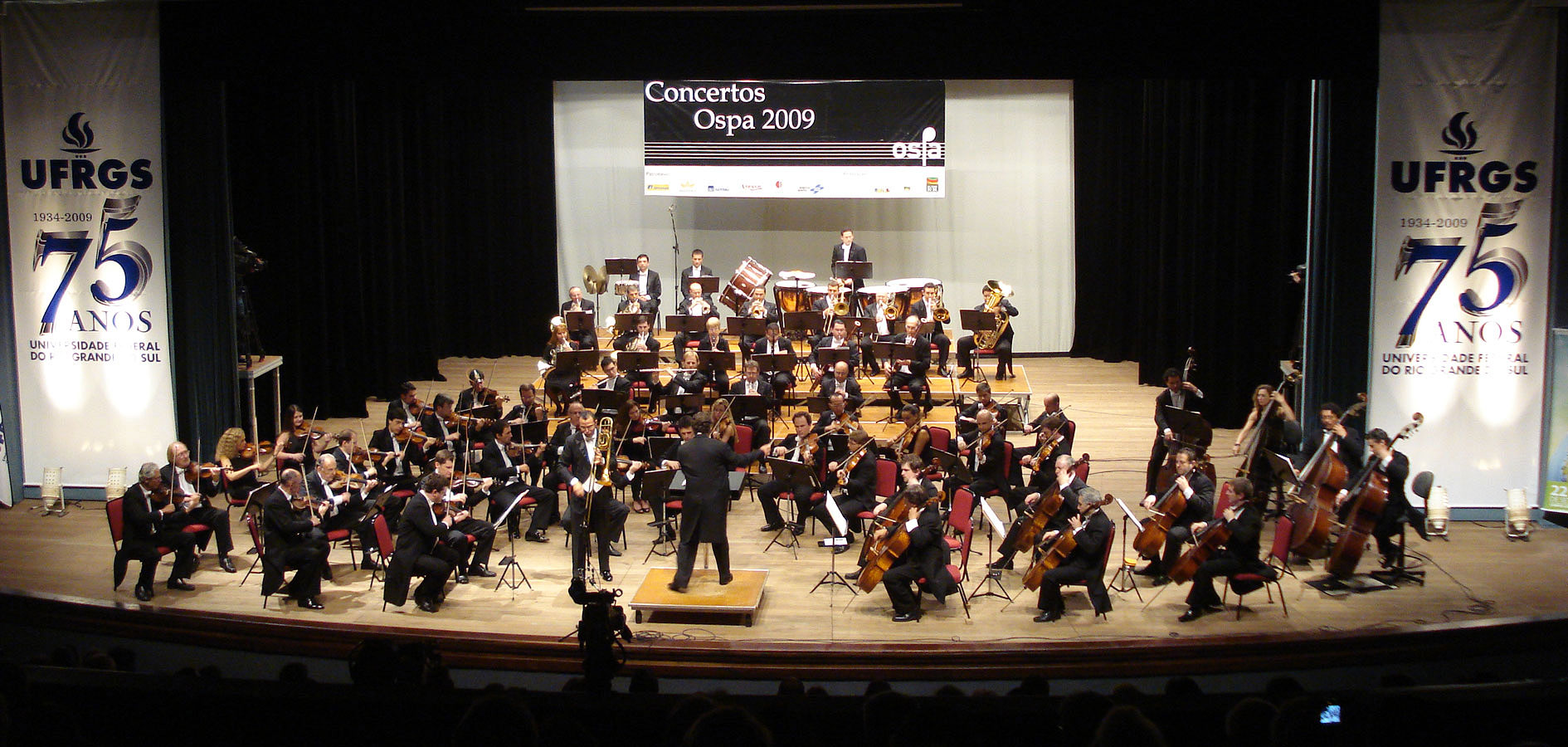 Concerto da Orquestra Sinfônica de Porto Alegre no salão de atos da UFRGS. Solista: José Milton - Trombone. Regente: Osman Gioia